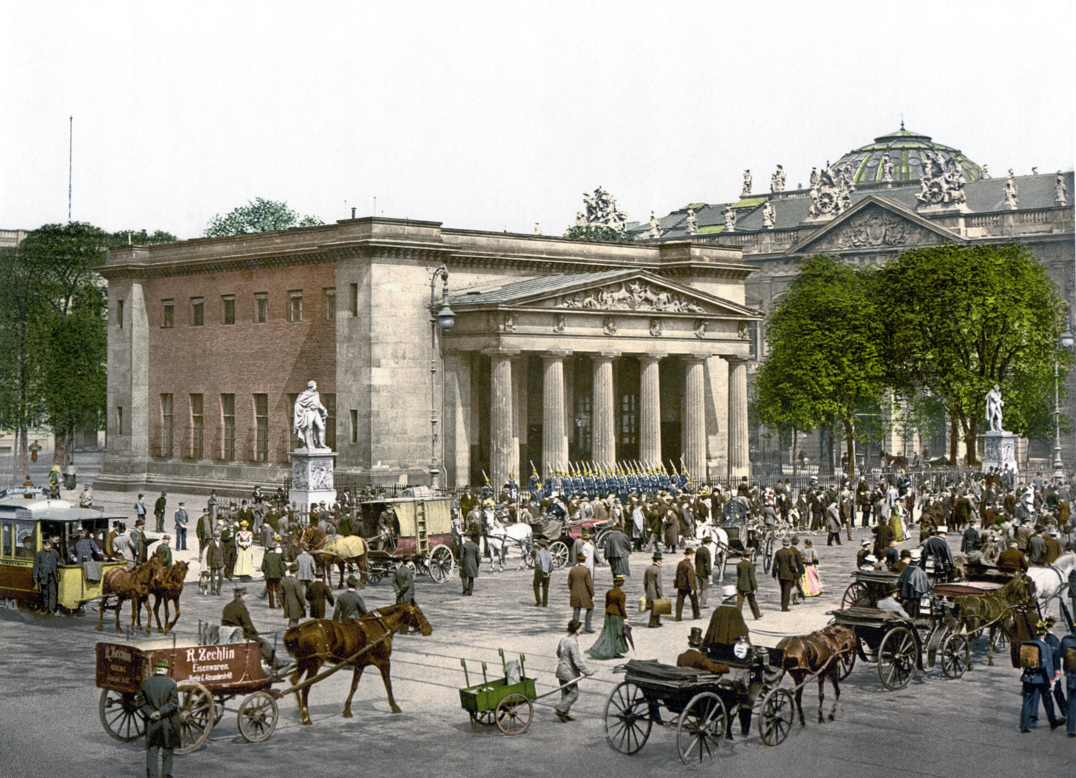 Neue Wache zwischen 1894 und 1902